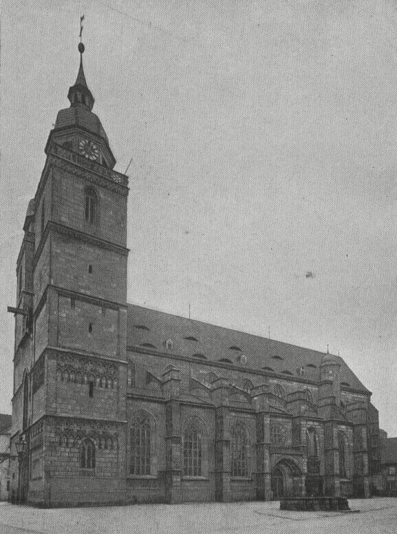 Seite 16, Abbildung 16, Untertitel: Stadtkirche. Ansicht des Langhauses von Süden.